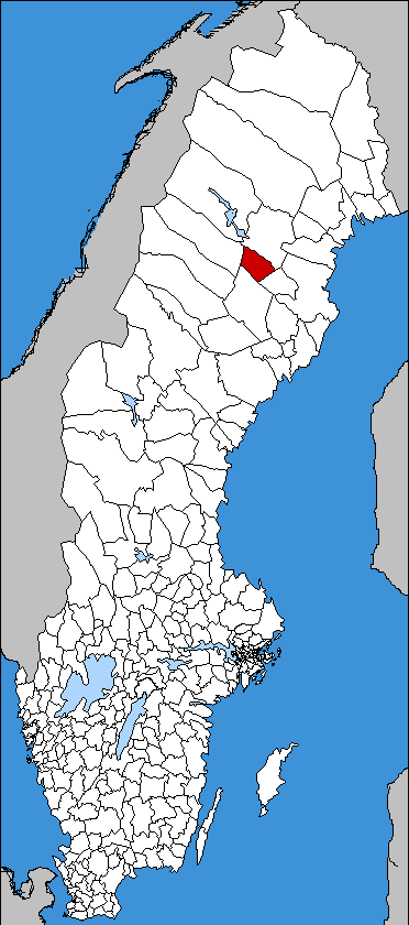 Malå kommun in Sweden